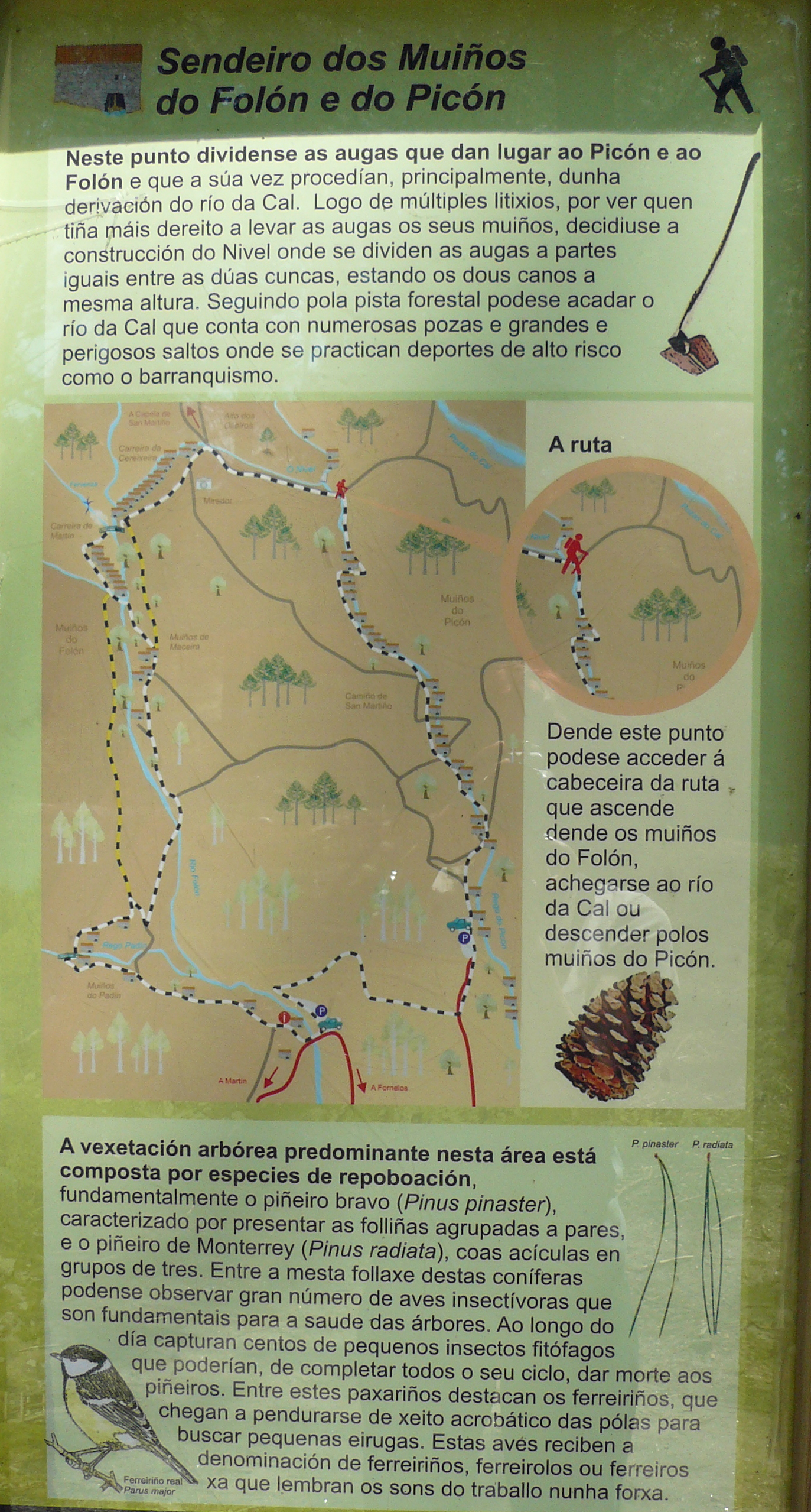 Ruta sendeirismo muíños Folón e do Picón